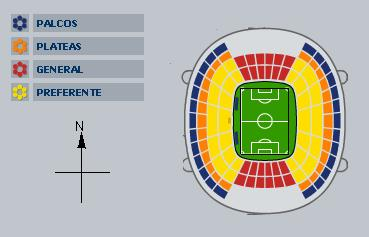 Mapa del estadio Morelos / Map of Morelos Stadium